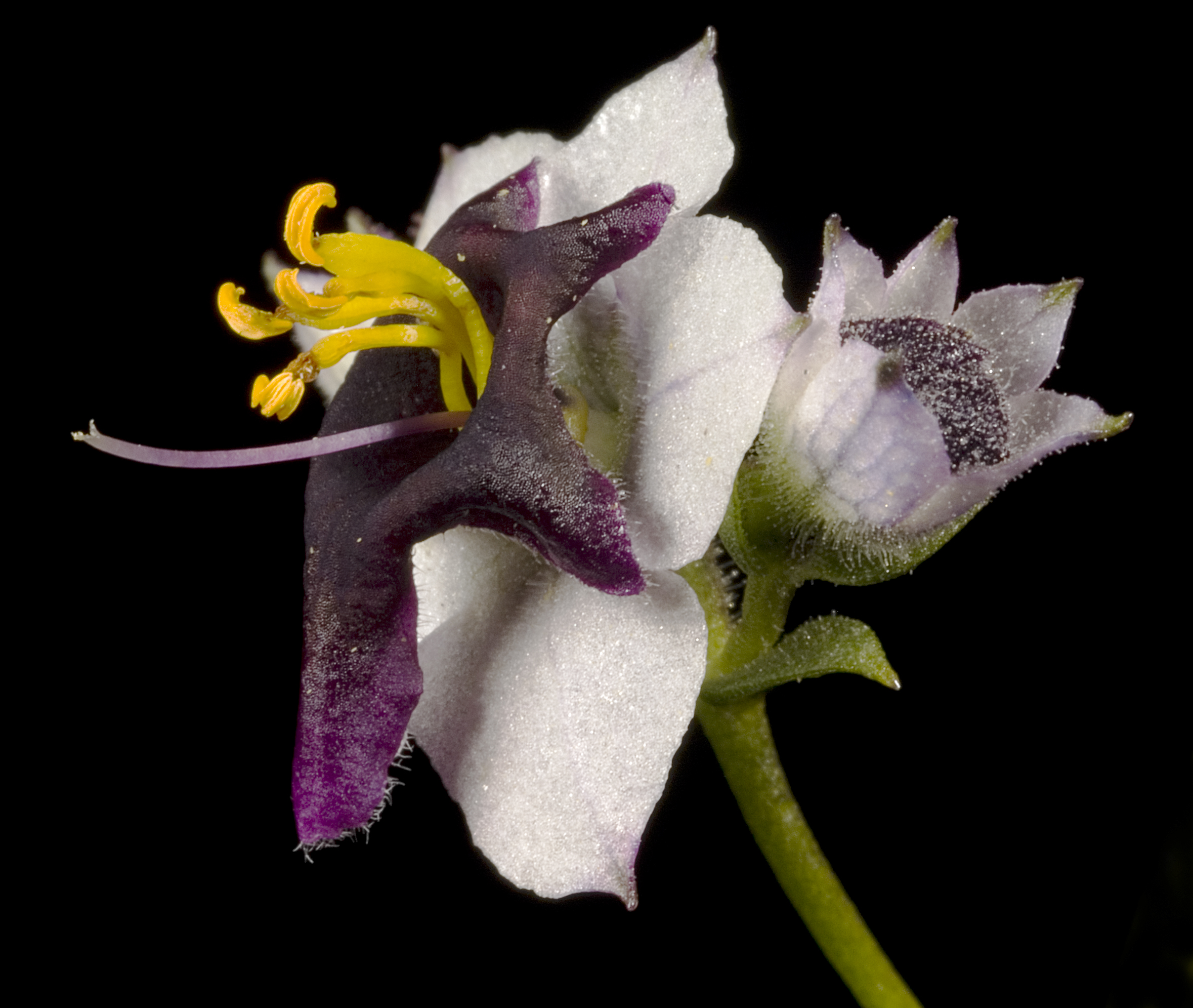 Cyanostegia lanceolata - Cáliz blancuzco-azulado extendido y corola purpúrea de tubo a penas más largo; estambres exertos.